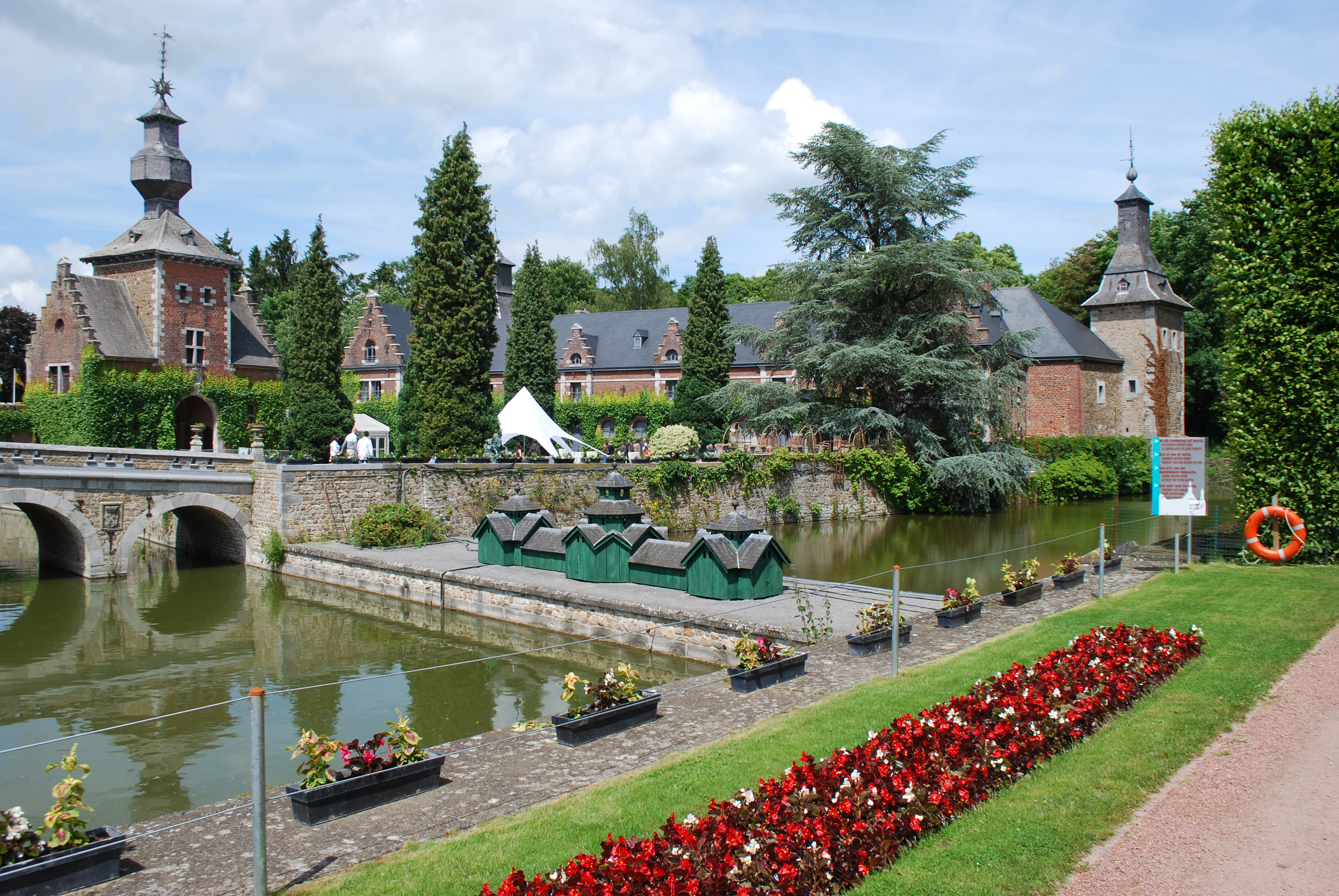 Vue du château de Jehay.